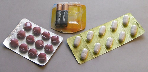 Vezikpakoj. Foto farita de Luis Guillermo Restrepo Rivas, kiun la aŭtoro liveras por publika kaj libera uzado far iu ajn homo aŭ maŝino.